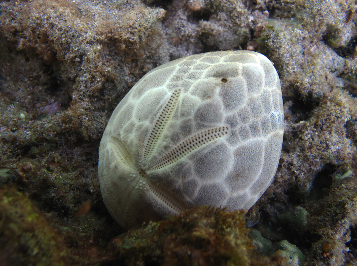 Le test (coquille) prédaté d'un oursin irrégulier Brissus latecarinatus à la Réunion.